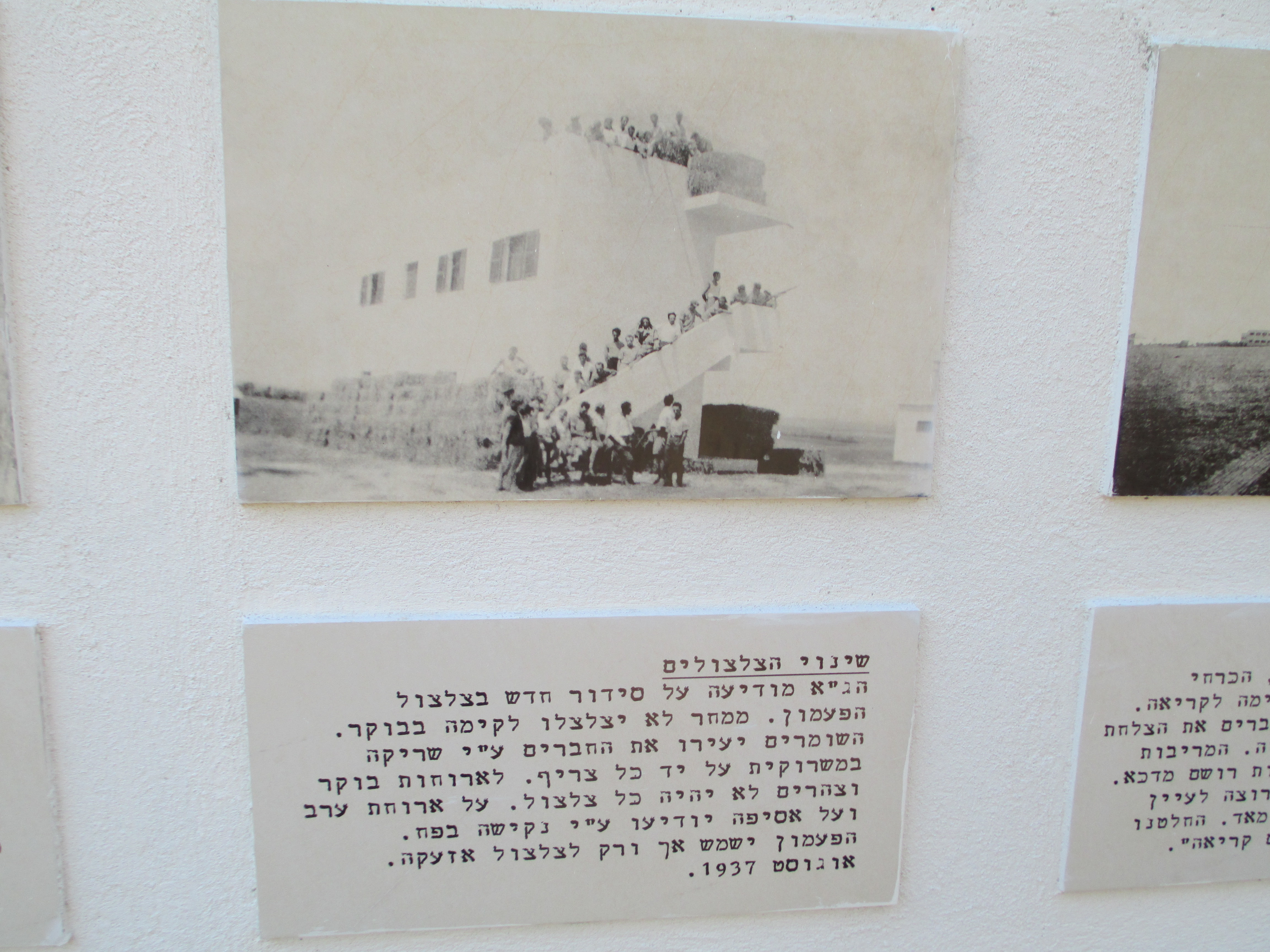 הודעה על שינוי הצלצולים בשפיים-בתערוכה פתוחה על תודות שפיים במרכז הקיבוץ